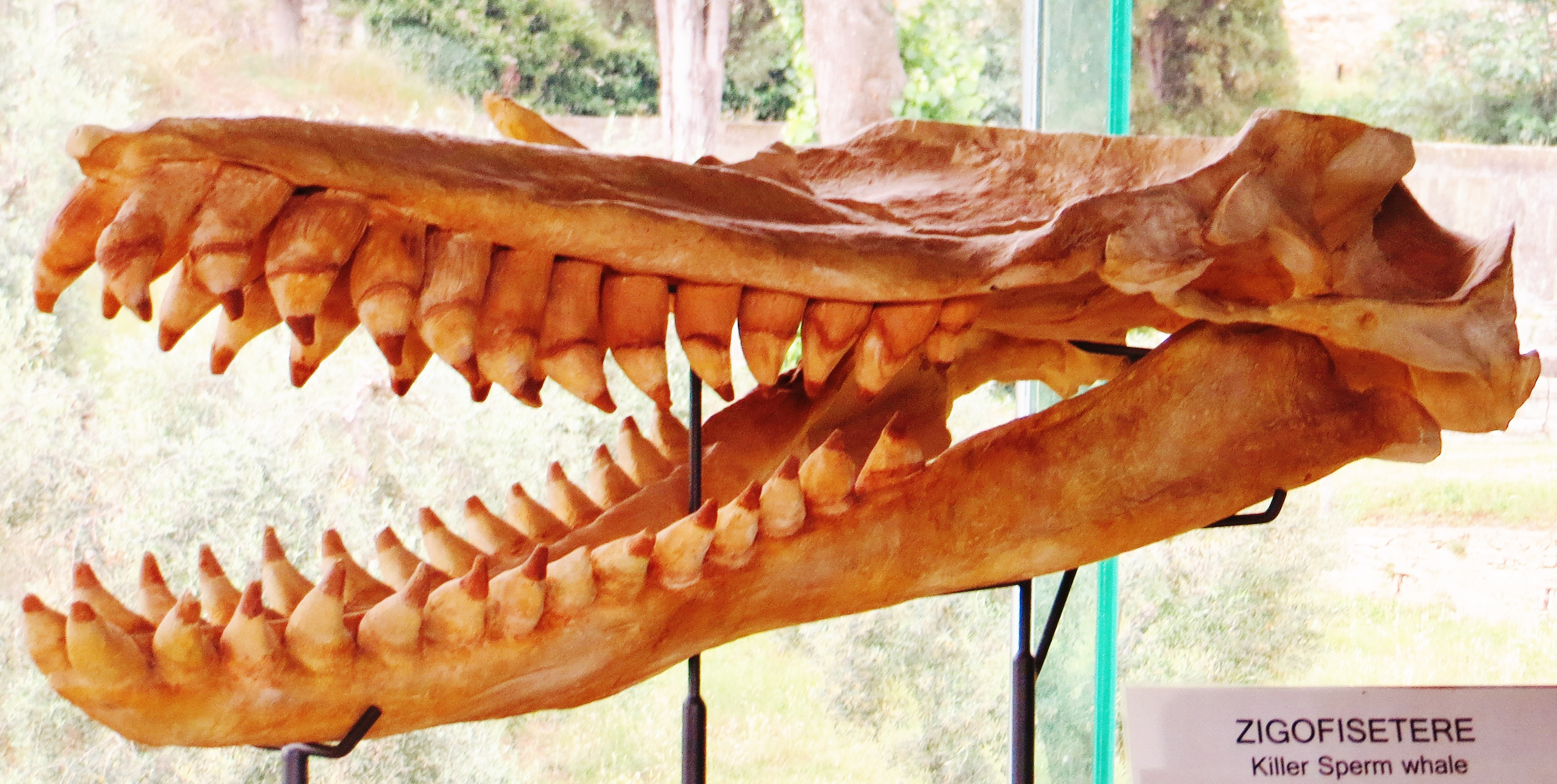 Fossil - Took the picture at Museo di Storia Naturale di Calci - Pisa